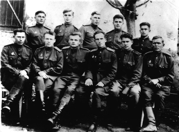 Офицеры 1 гвардейского Николаевского Краснознаменного укрепленного района.